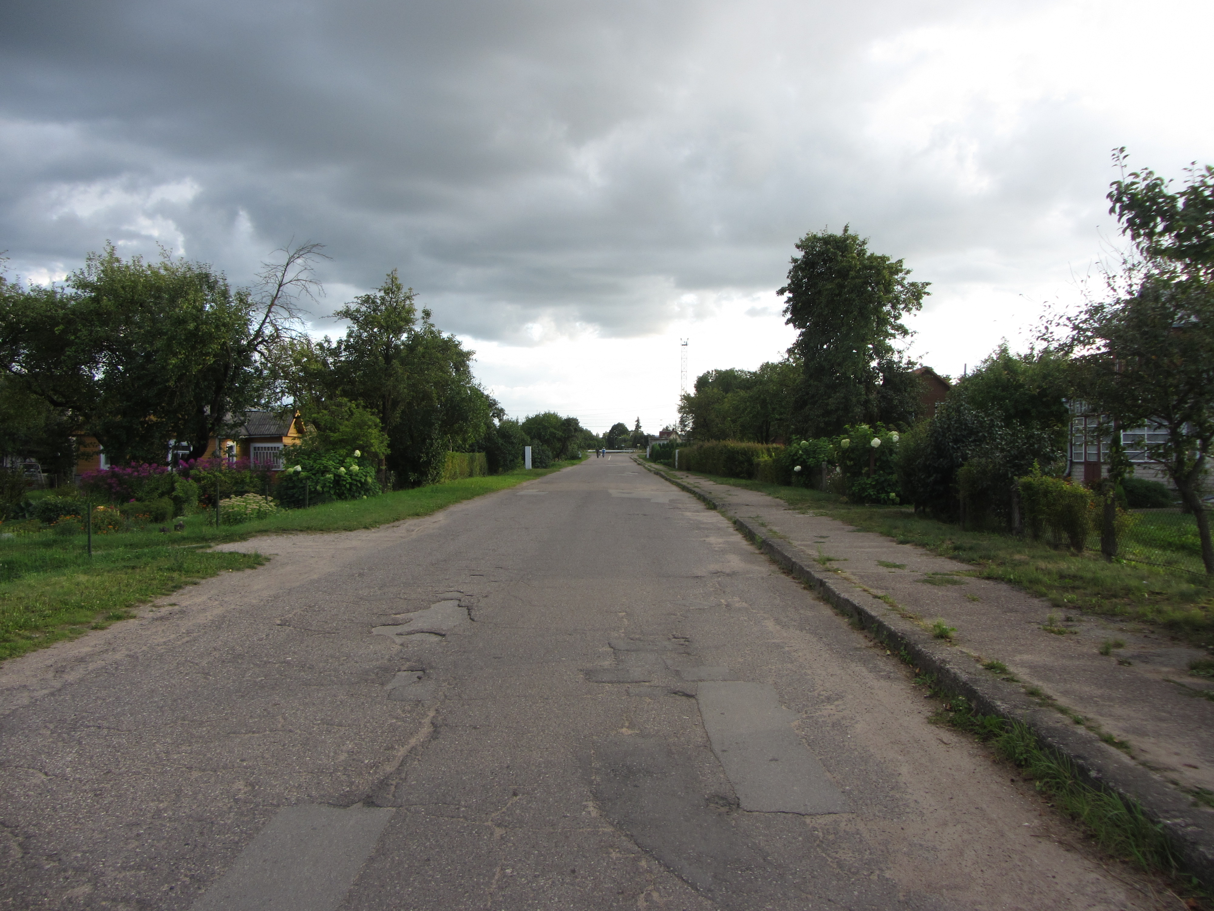 Pilypiškės, Lithuania